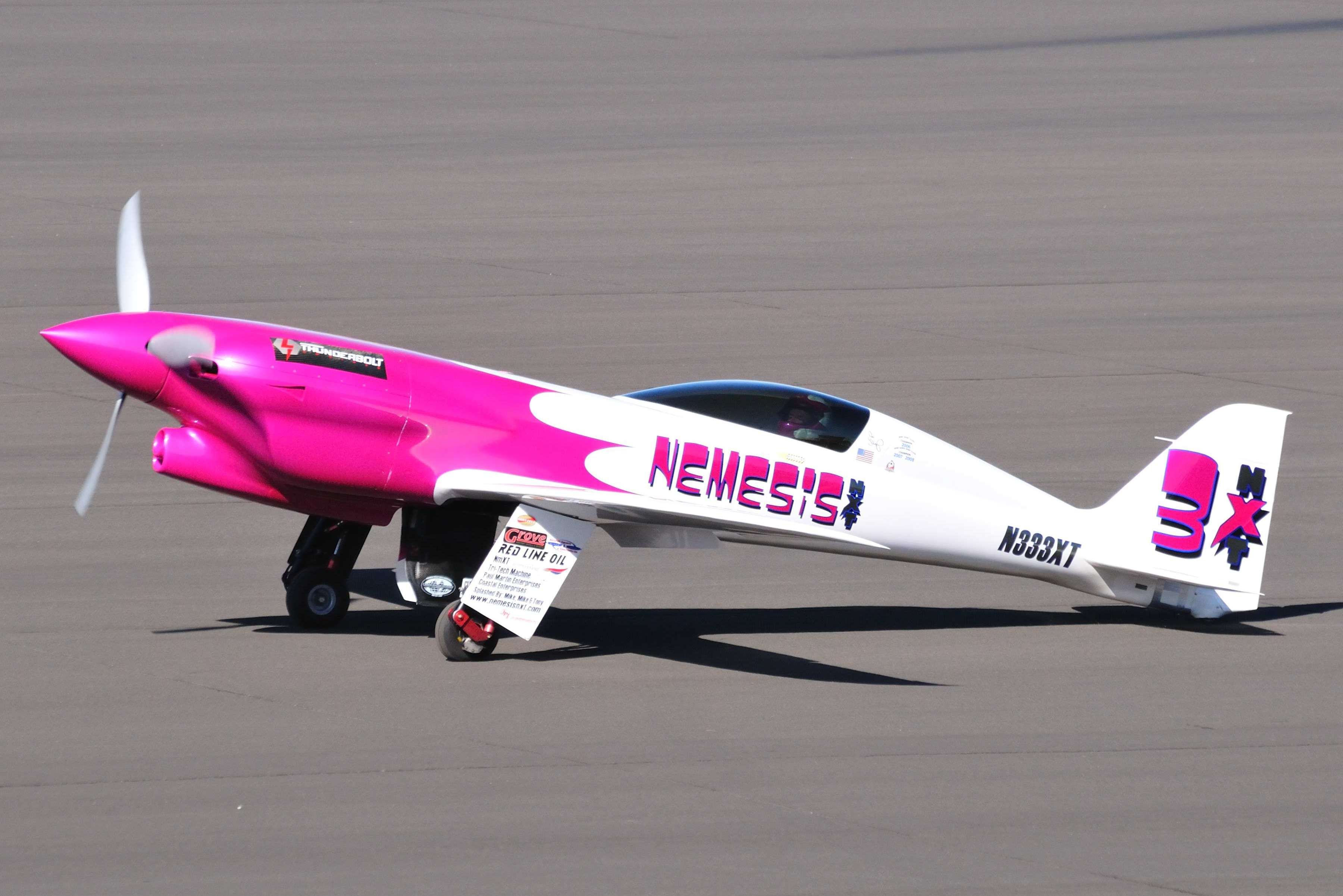 Reno Air Races 2009